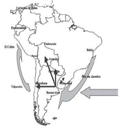 מהיכן הגיעו העבדים